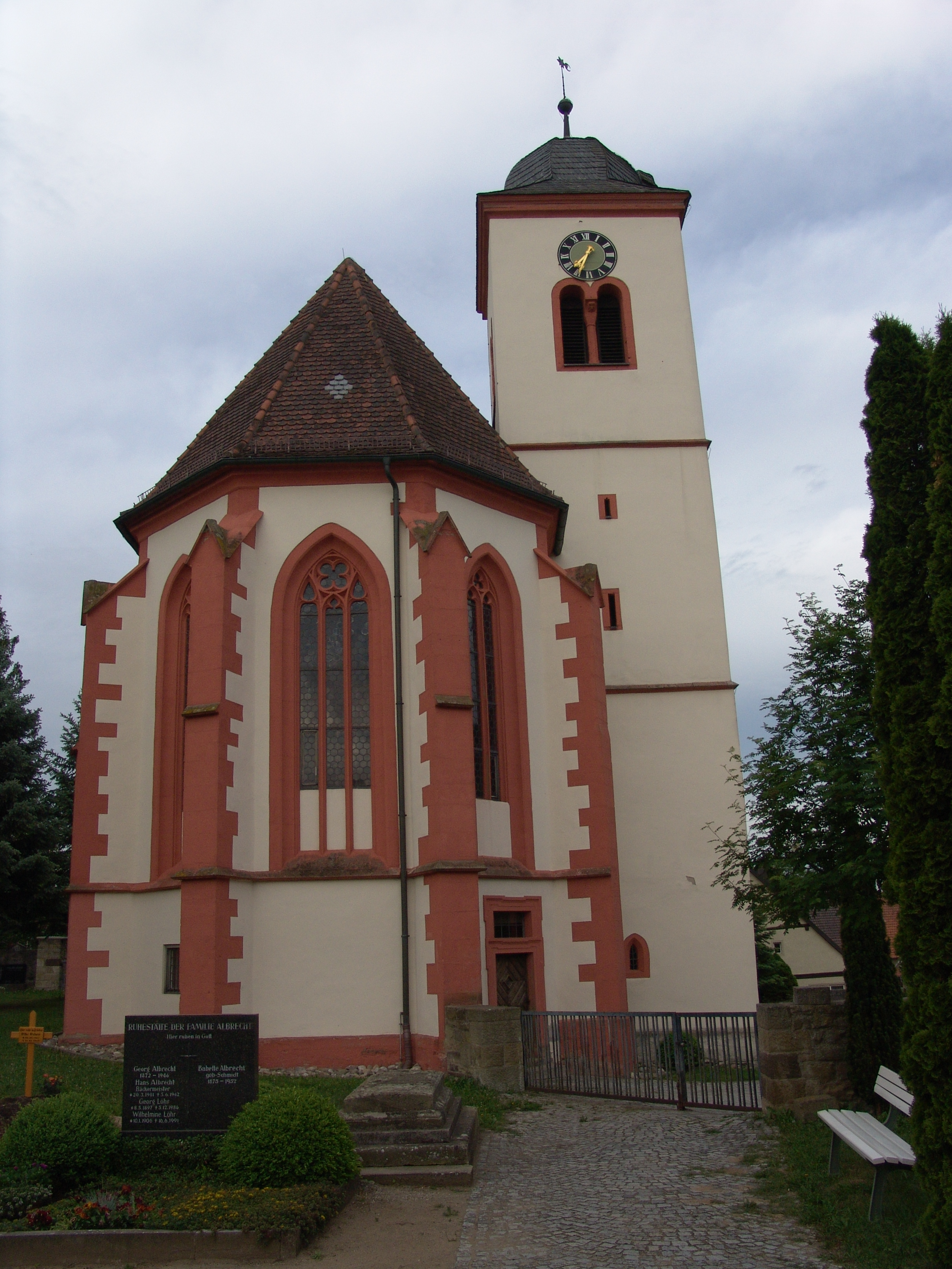 evang.-luth Kirche in Gnodstadt